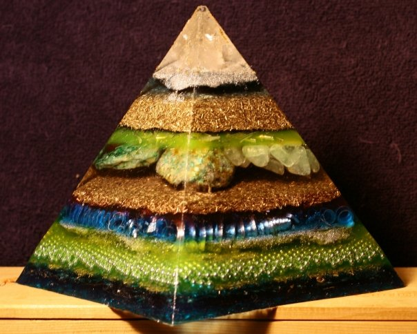 Orgonu piramīda